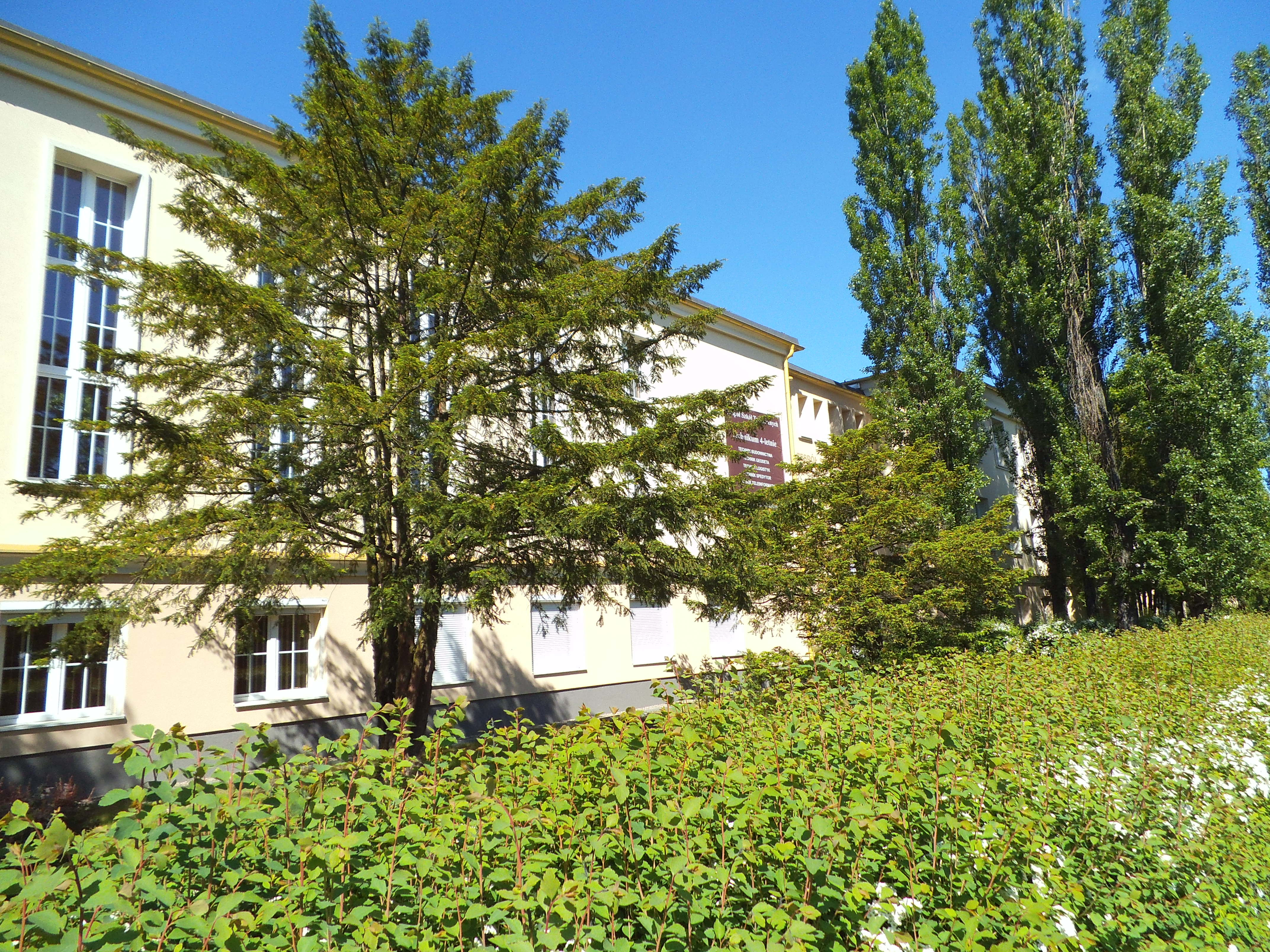 Zespół Szkół Technicznych w Toruniu